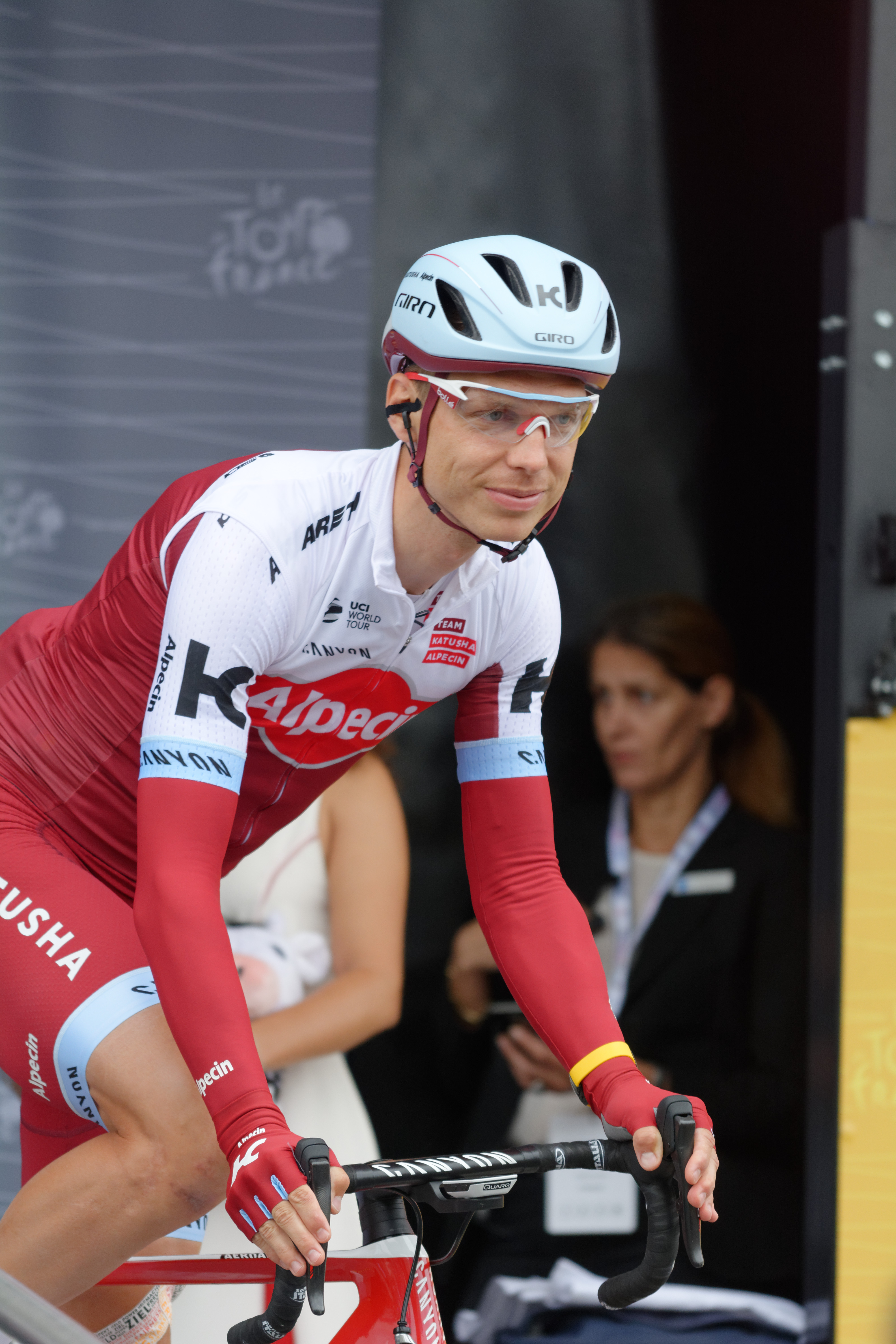 Tour de France 2017 Stage 2 Düsseldorf